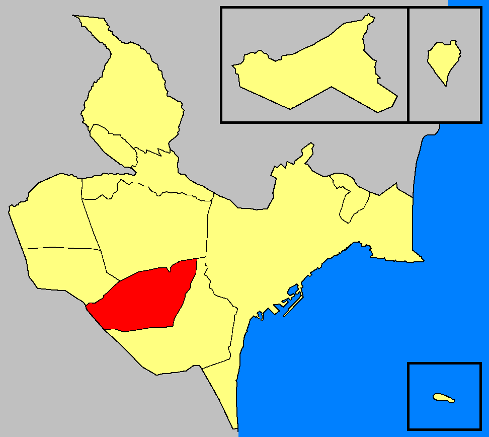 Entidades de población del término municipal de Alicante